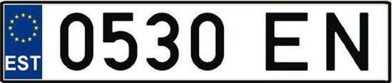 Однорядный тракторный номер Эстонии